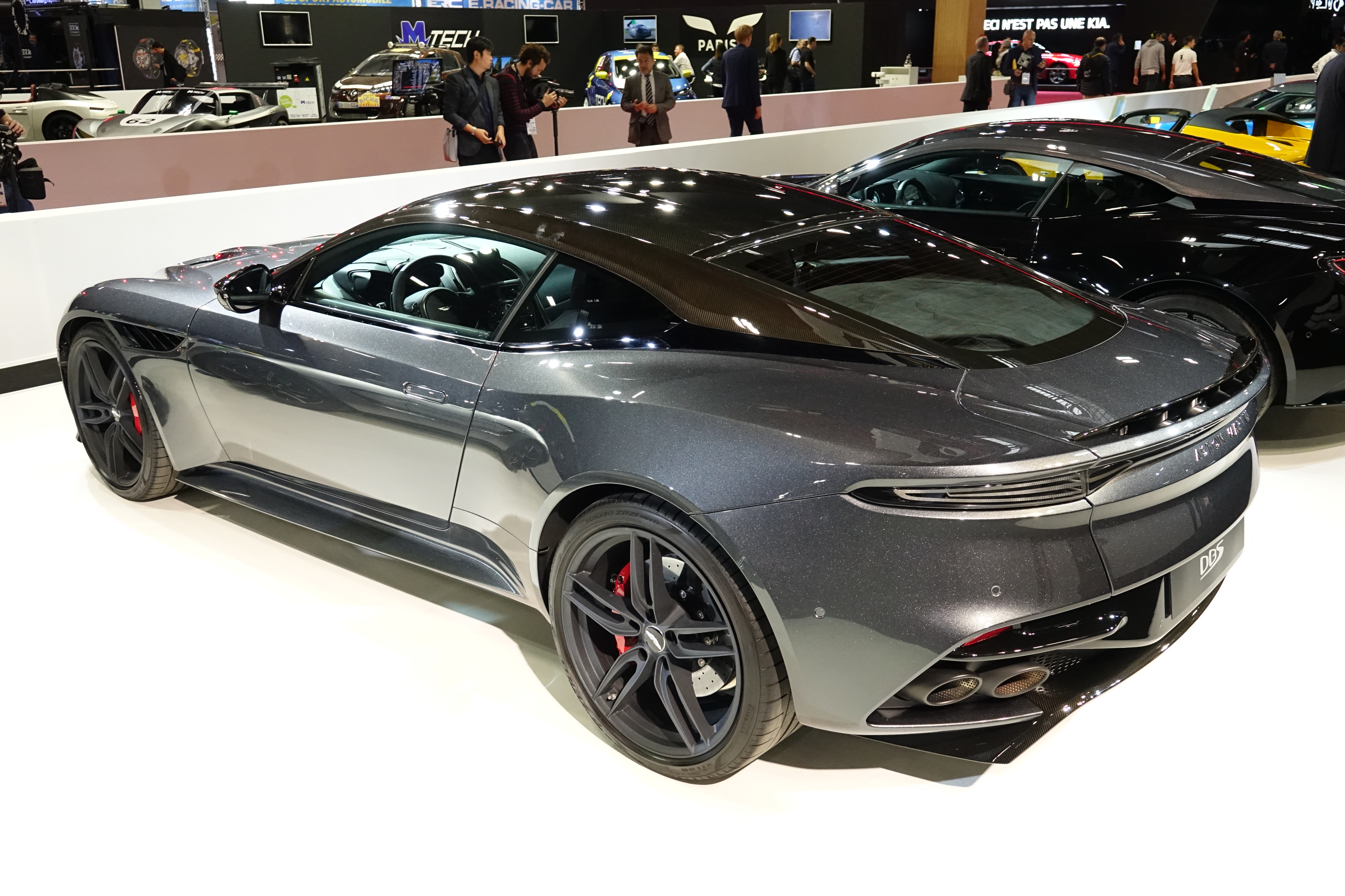 Aston Martin DBS Superleggera au Mondial Paris Motor Show 2018